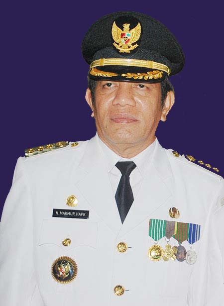 Bupati Berau